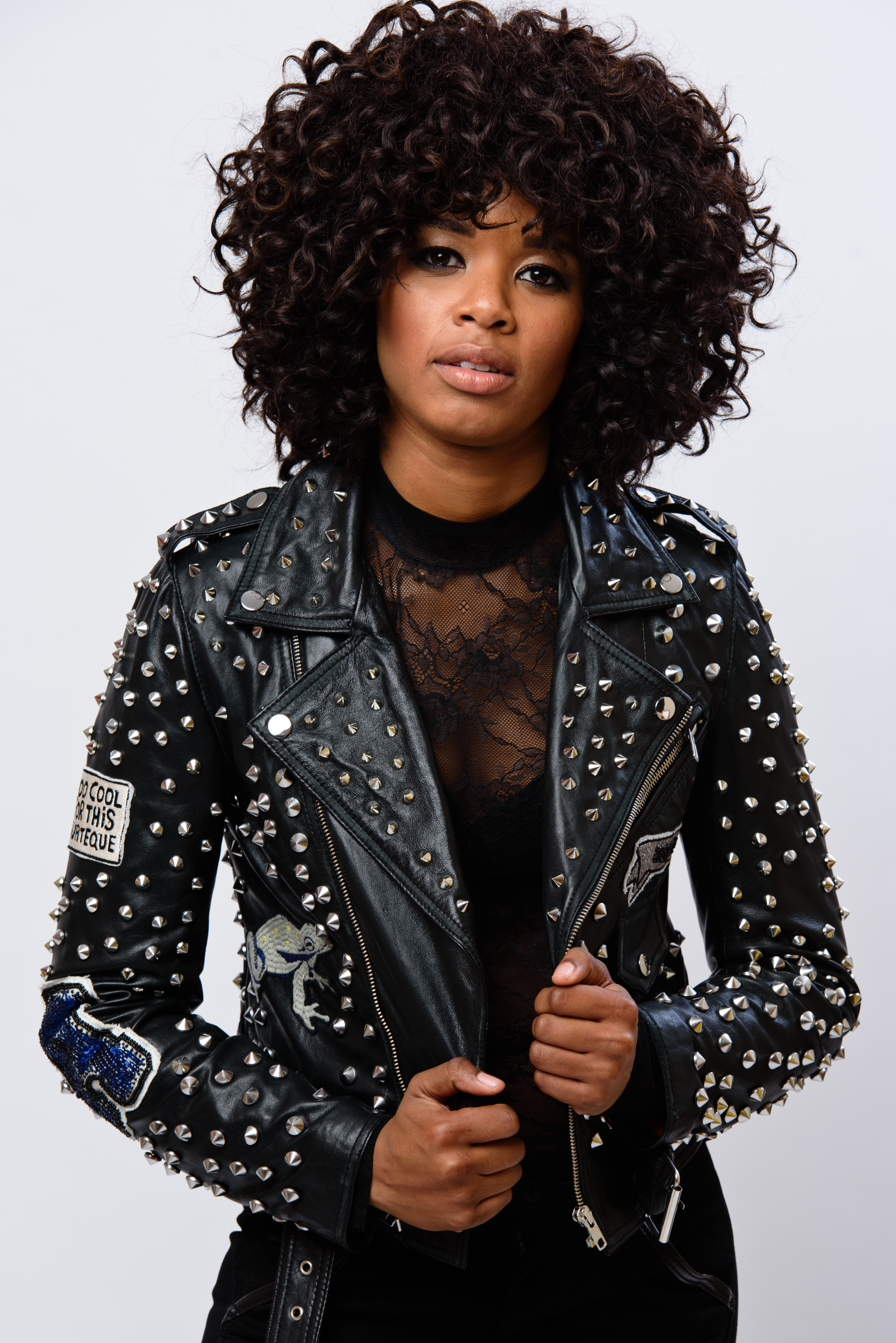 Shary-Ann, Foto credits: Annemieke van der Togt